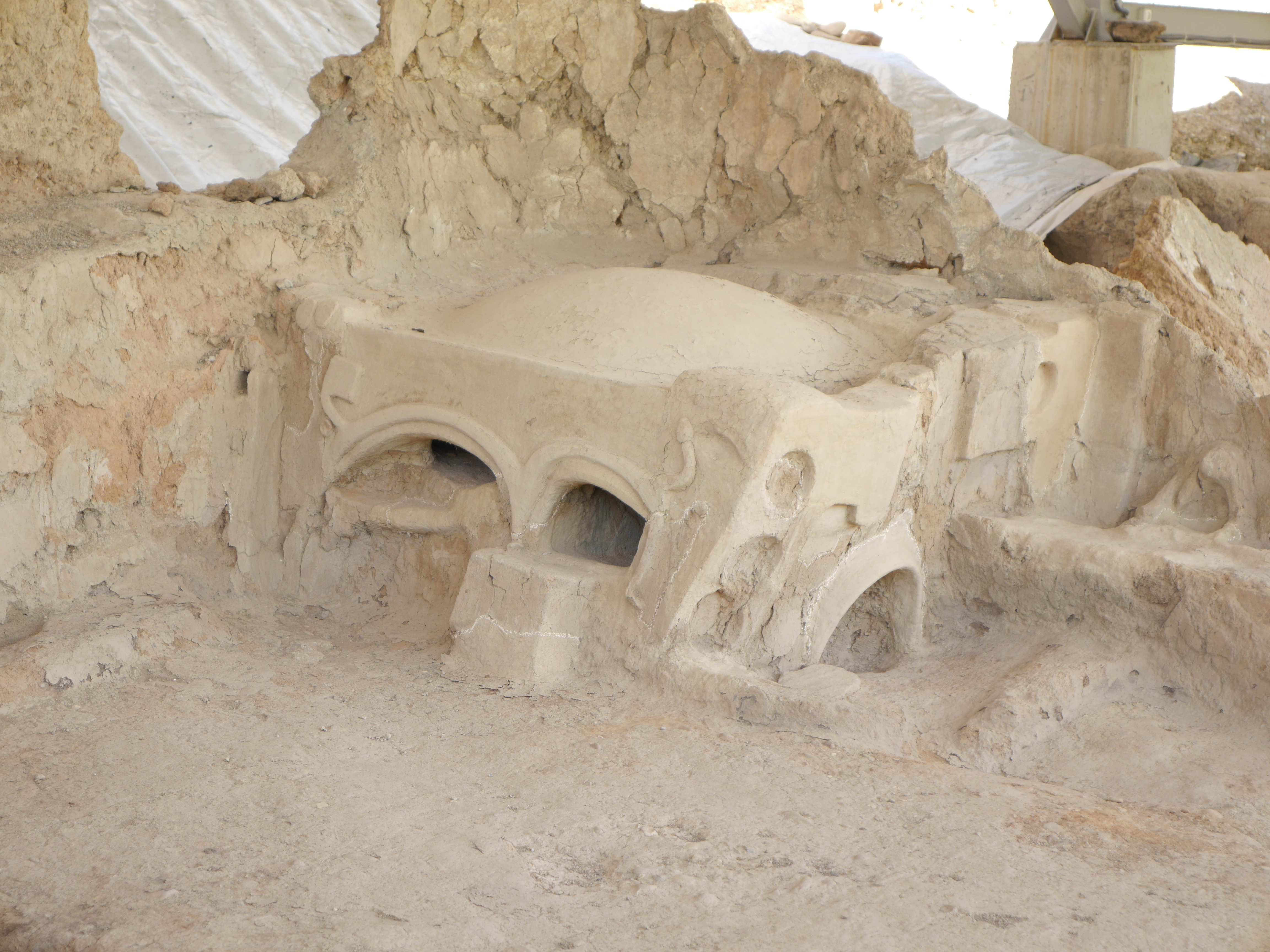 გრაკლიანი გორა